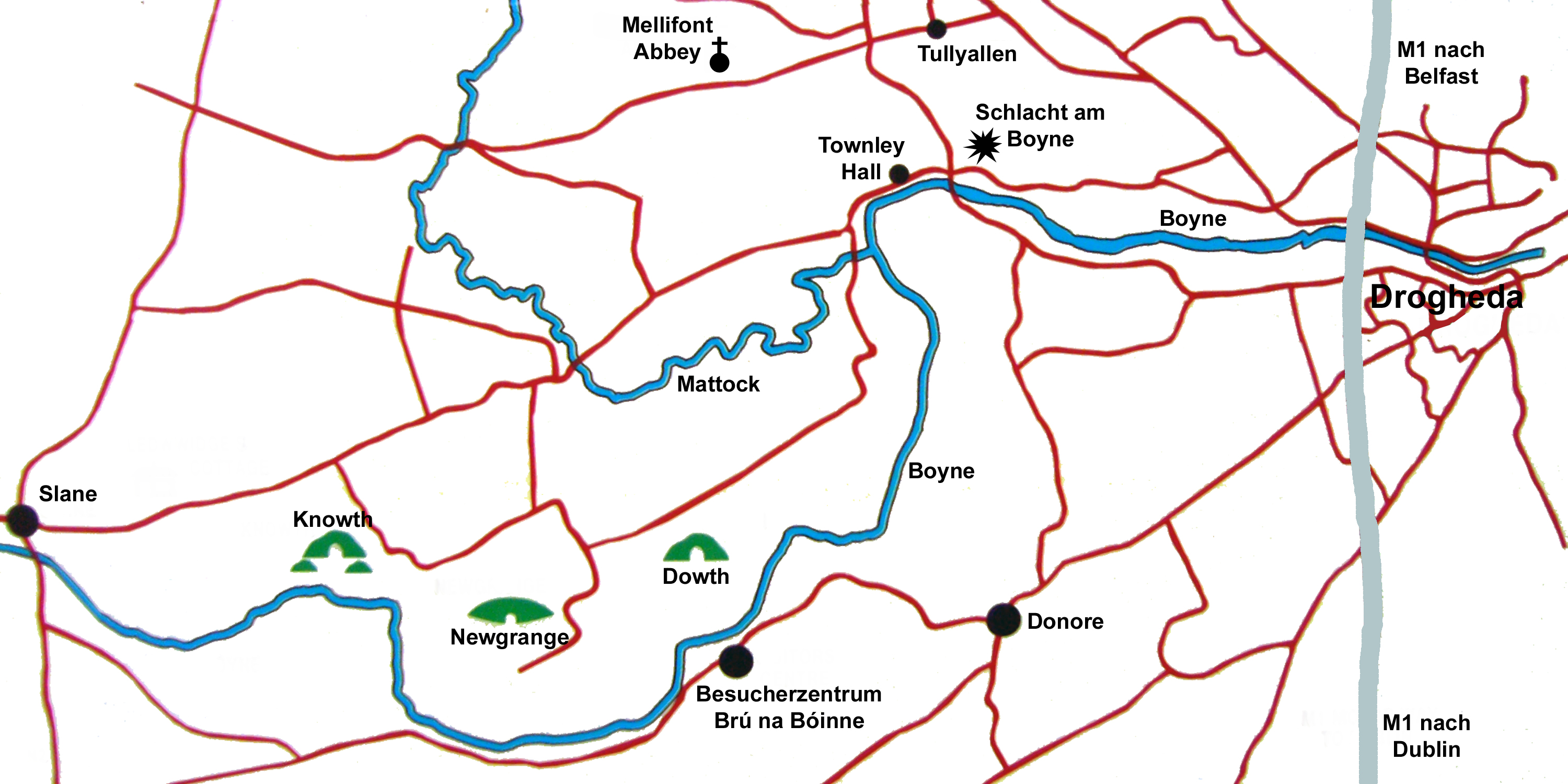 Übersichtskarte des Boyne Valley, Irland, mit den Orten Schlacht am Boyne, Brú na Bóinne, Newgrange, Dowth, Knowth, Mellifont Abbey und Umgebung